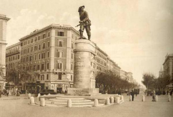 Monumento al Bersagliere, Roma